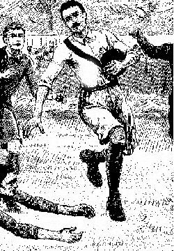 Dibujo que representa a un jugador de Flores Athletic con su clásica camiseta blanca cruzada con una banda negra.